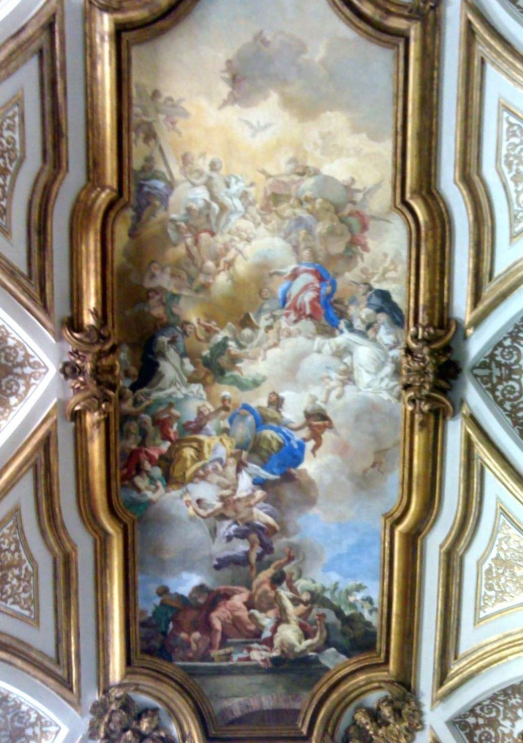 Trionfo della fede sull'eresia per opera dei Domenicani